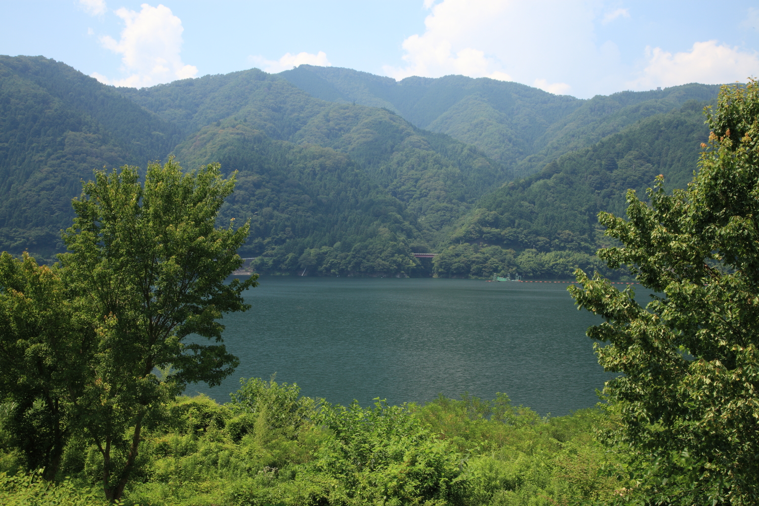 奥矢作湖（豊田市牛地町、2012年）